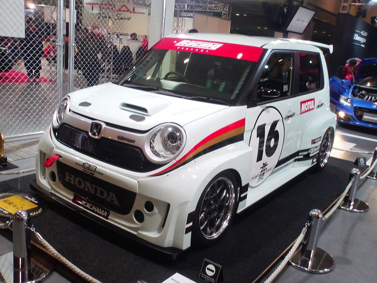 大阪オートメッセ2013で展示されていた無限N-ONEレーシングコンセプトをフロントから撮影。